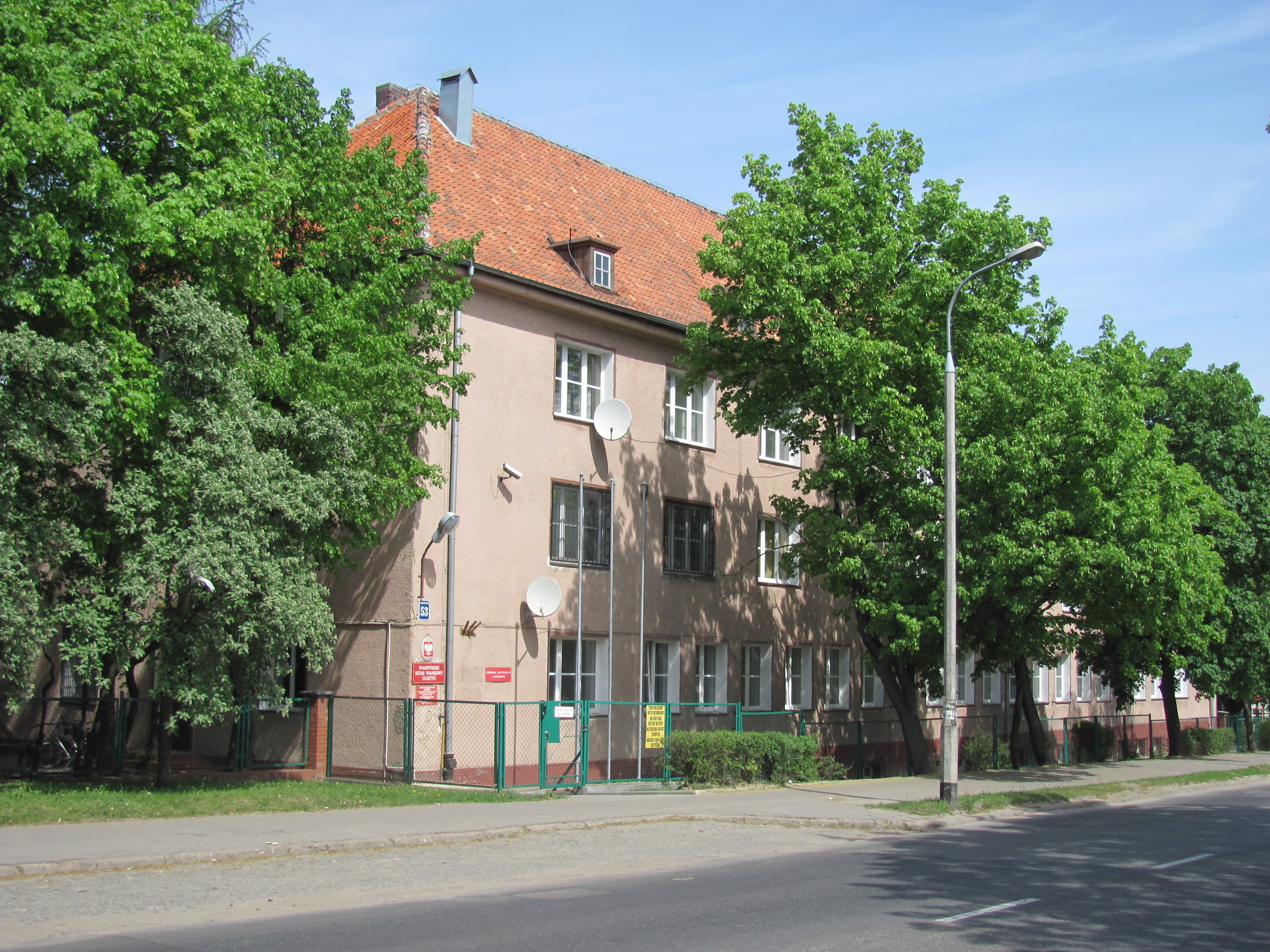 Olsztyn, ul. Jagiellońska 53 - budynek WSzW